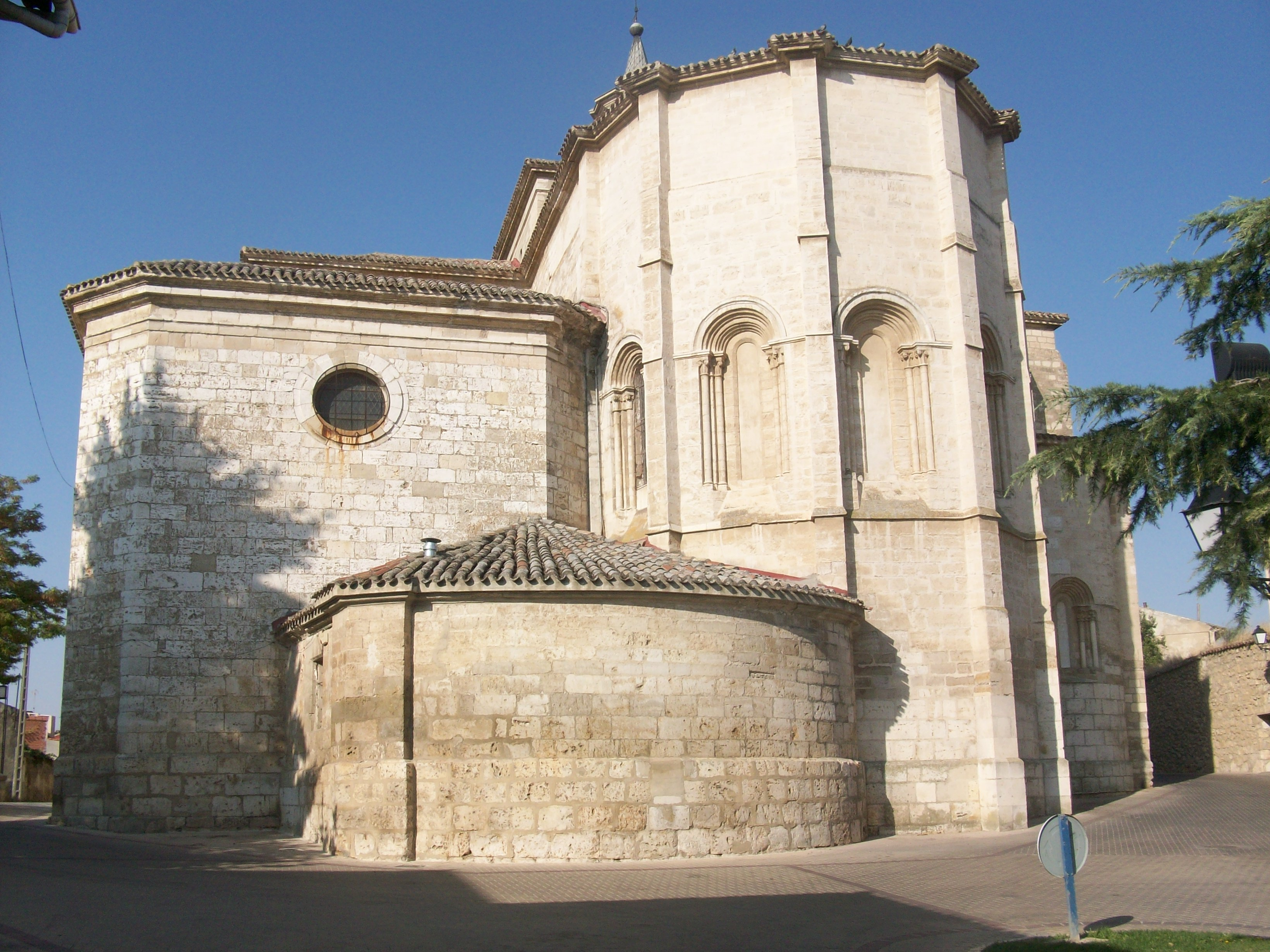 Cabecera de la iglesia de Santa María de la Asunción de Dueñas, donde se puede observar la pervivencia de elementos Románicos en los ábsides central y septentrional.